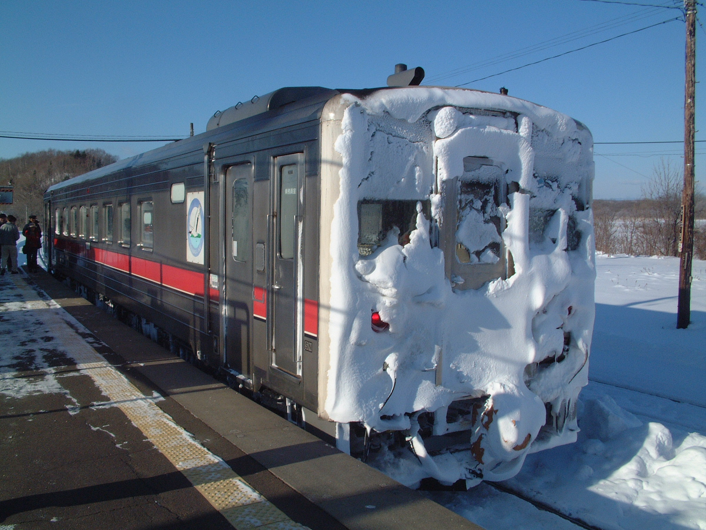 JR北海道キハ54形気動車（キハ54 519）JR北海道釧網本線、塘路駅で撮影